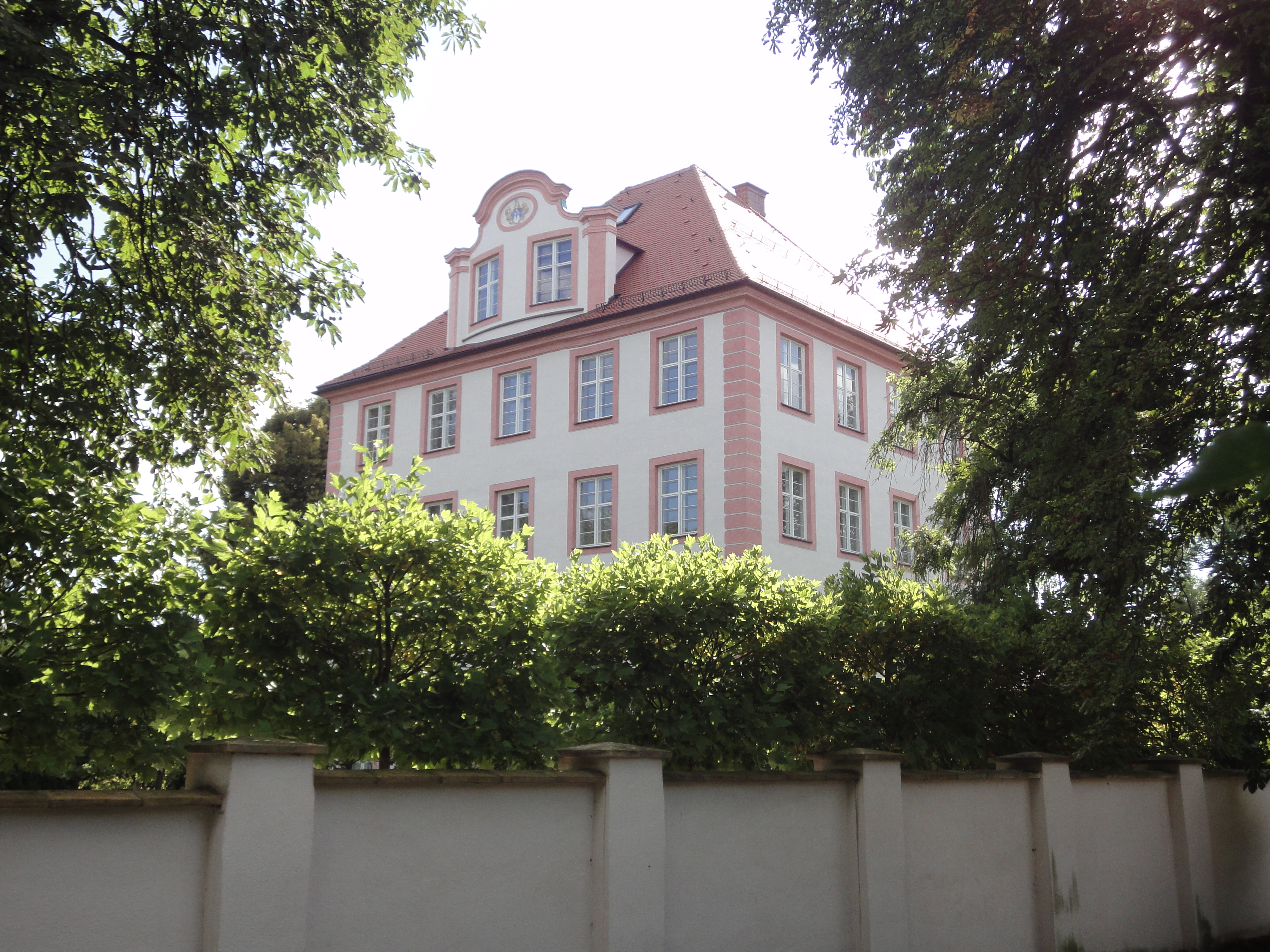 Schloss, ursprünglich Wasserschloss, rechtwinklige Anlage unter Anton Fugger errichtet, einzelne Mauerteile mittelalterlich, im Kern Ende 16. Jahrhundert, um 1730 erneuert, Umgestaltung letztes Viertel 18. Jahrhundert; sog. Hochschloss, viergeschossiger Walmdachbau mit östlichem Zwerchgiebel mit geschwungenem Abschluss und westlich vorgebautem Treppenhaus mit zweigeteiltem Schweifgiebel; Ummauerung. Baudenkmal Bayern D-7-72-184-6